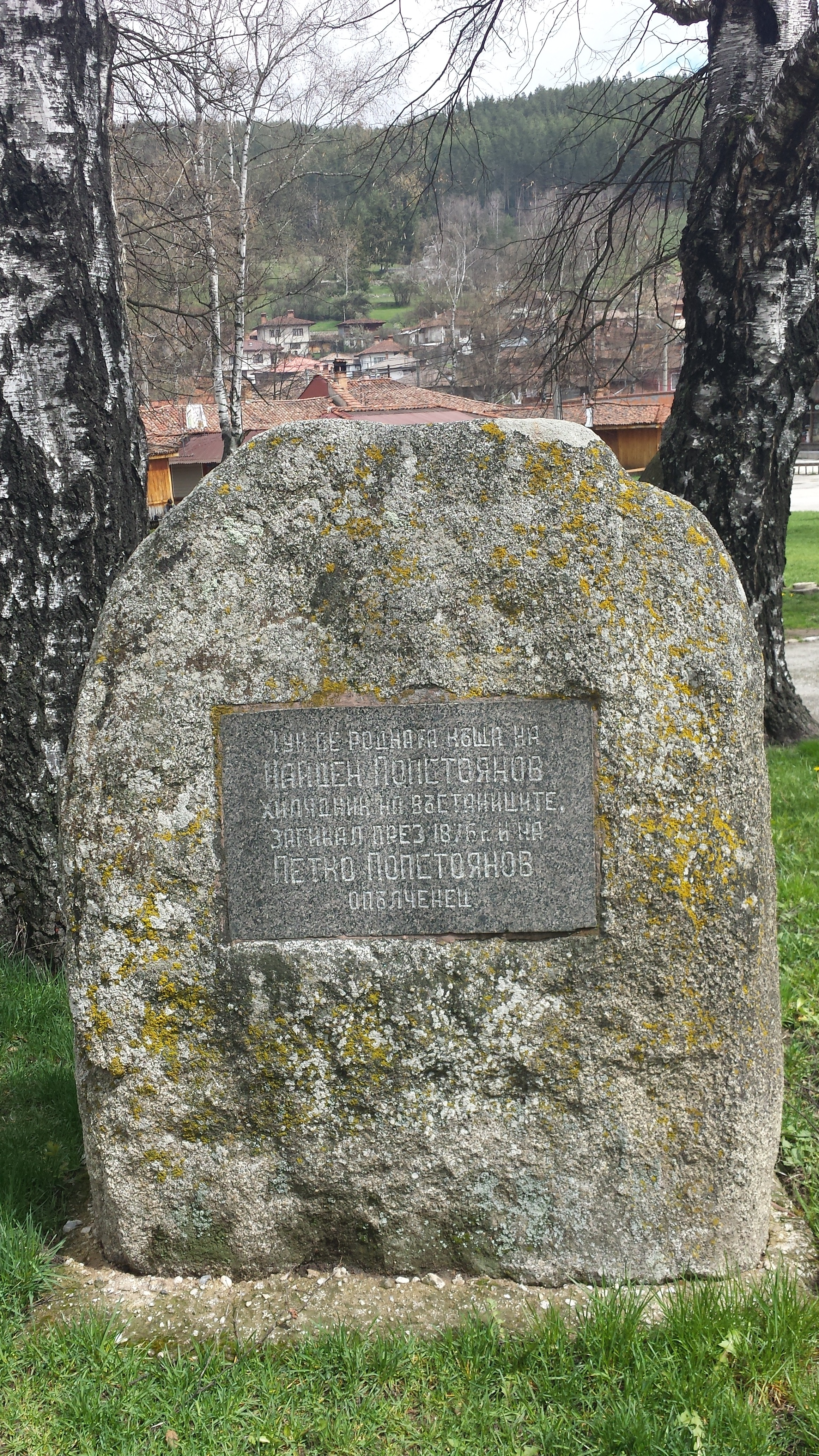 В памет на Найден и Петко Попстоянови